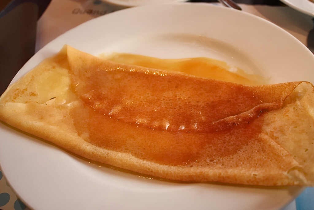 Eine Portion Crêpe Suzette, in einer Brasserie in Paris